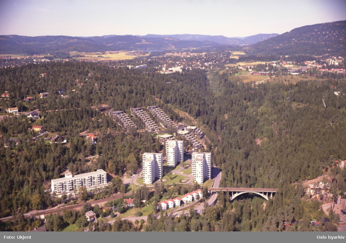 Ullern med Silurveien foran til venstre, Mærradalen og Husebyskogen til høyre, Holmenkollen bak til høyre